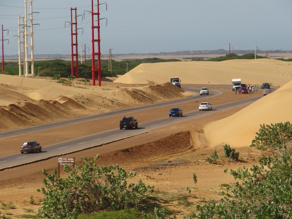 Carretera Coro-Punto Fijo atravesando el parque nacional Los Médanos de Coro del estado Falcón.